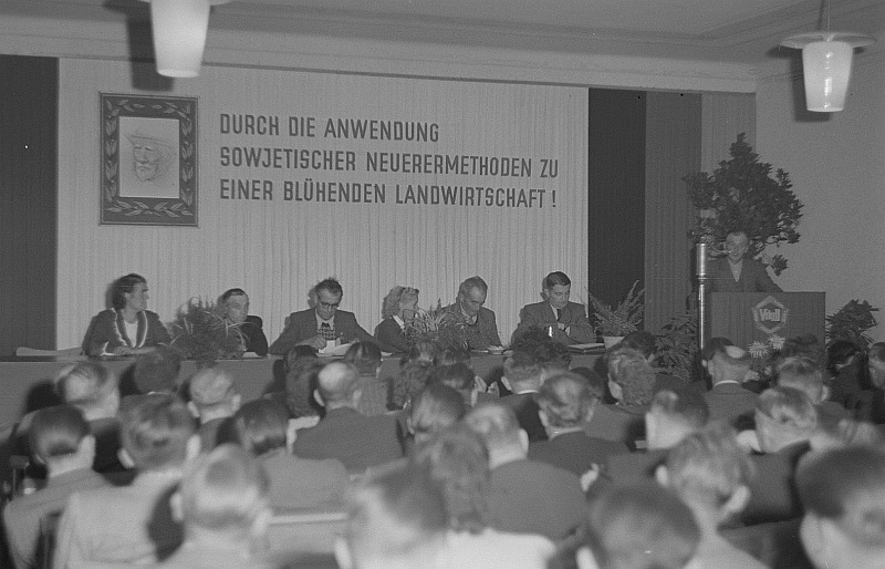 Original image description from the Deutsche Fotothek Blick auf das Präsidium